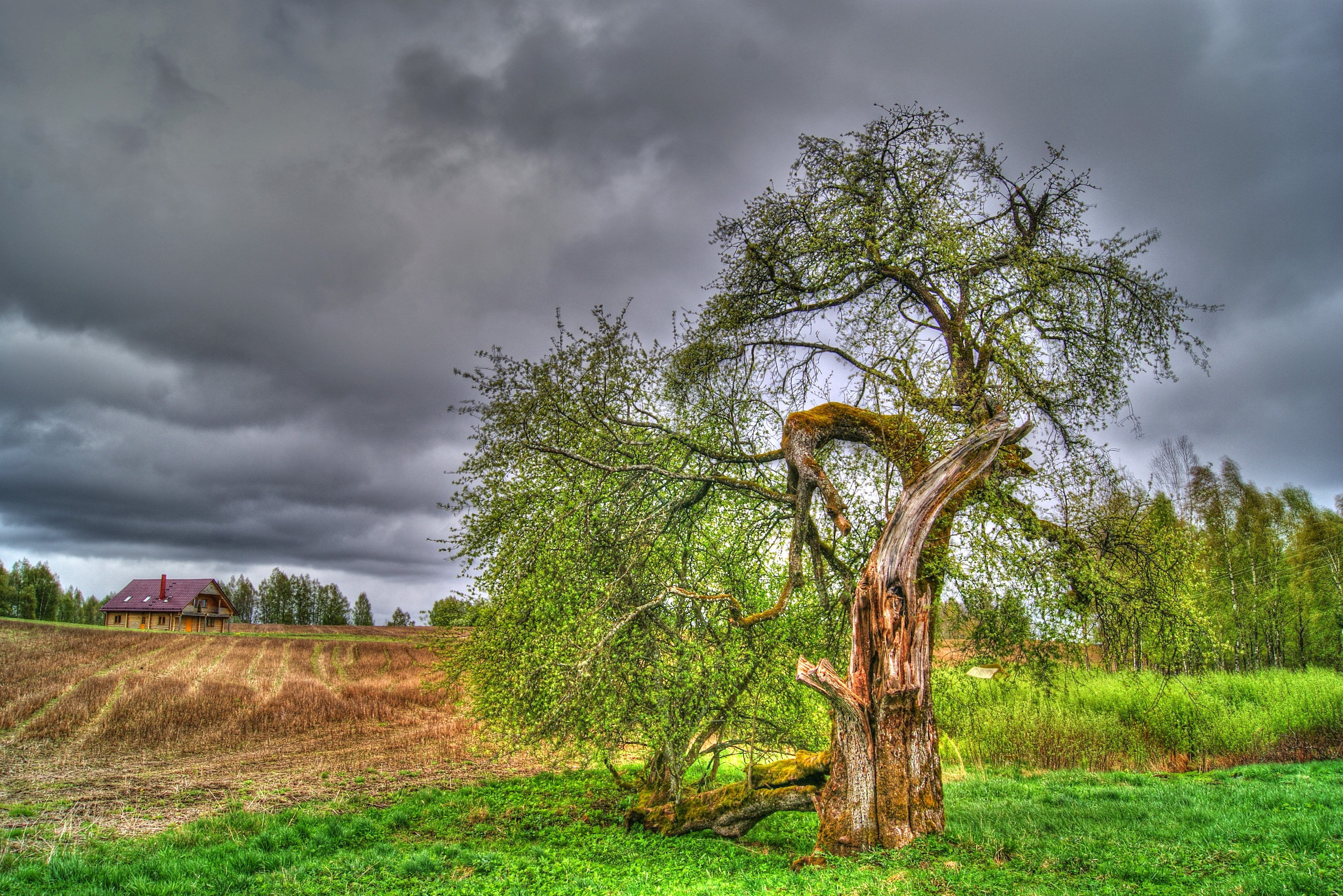 Ciemgaļu mežābele